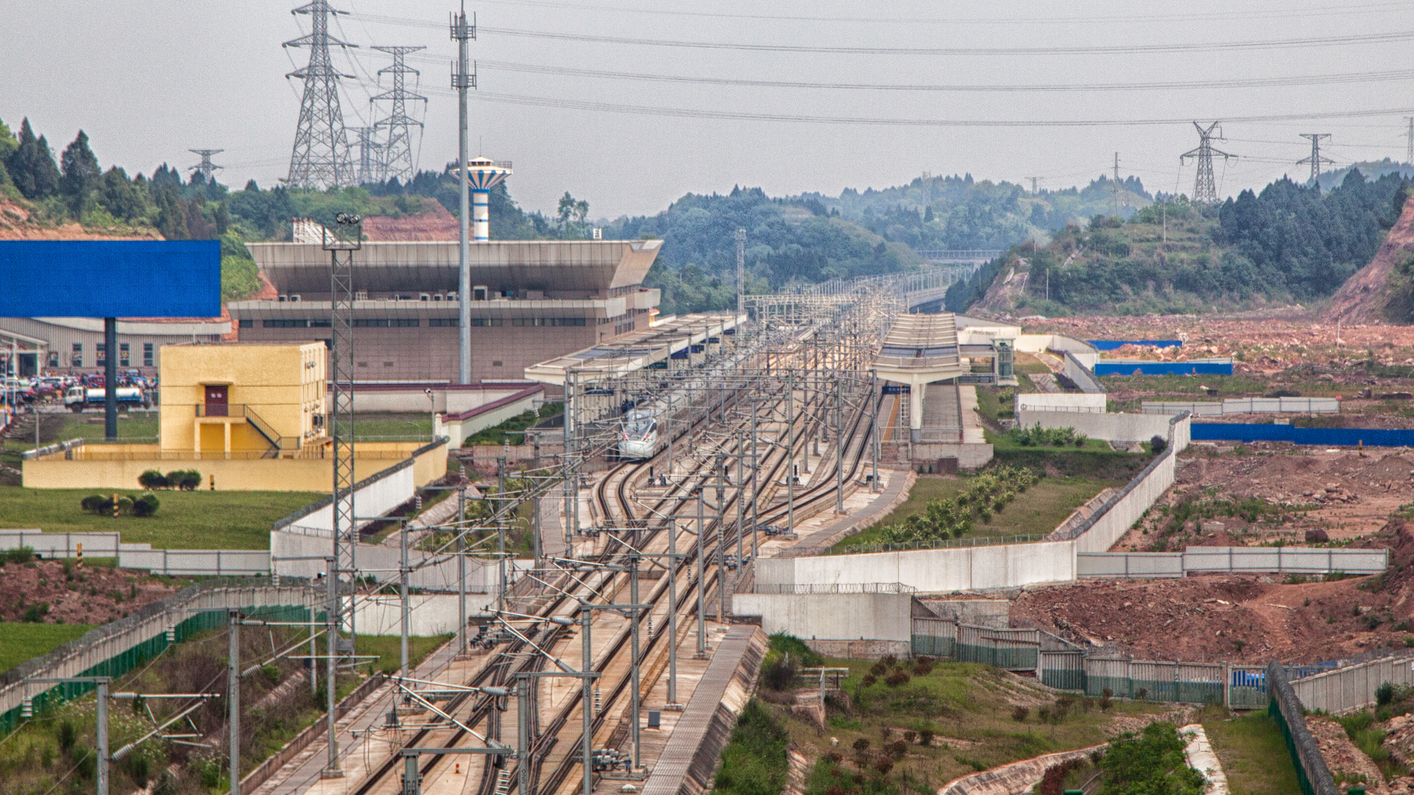 国铁成渝客运专线简阳南站